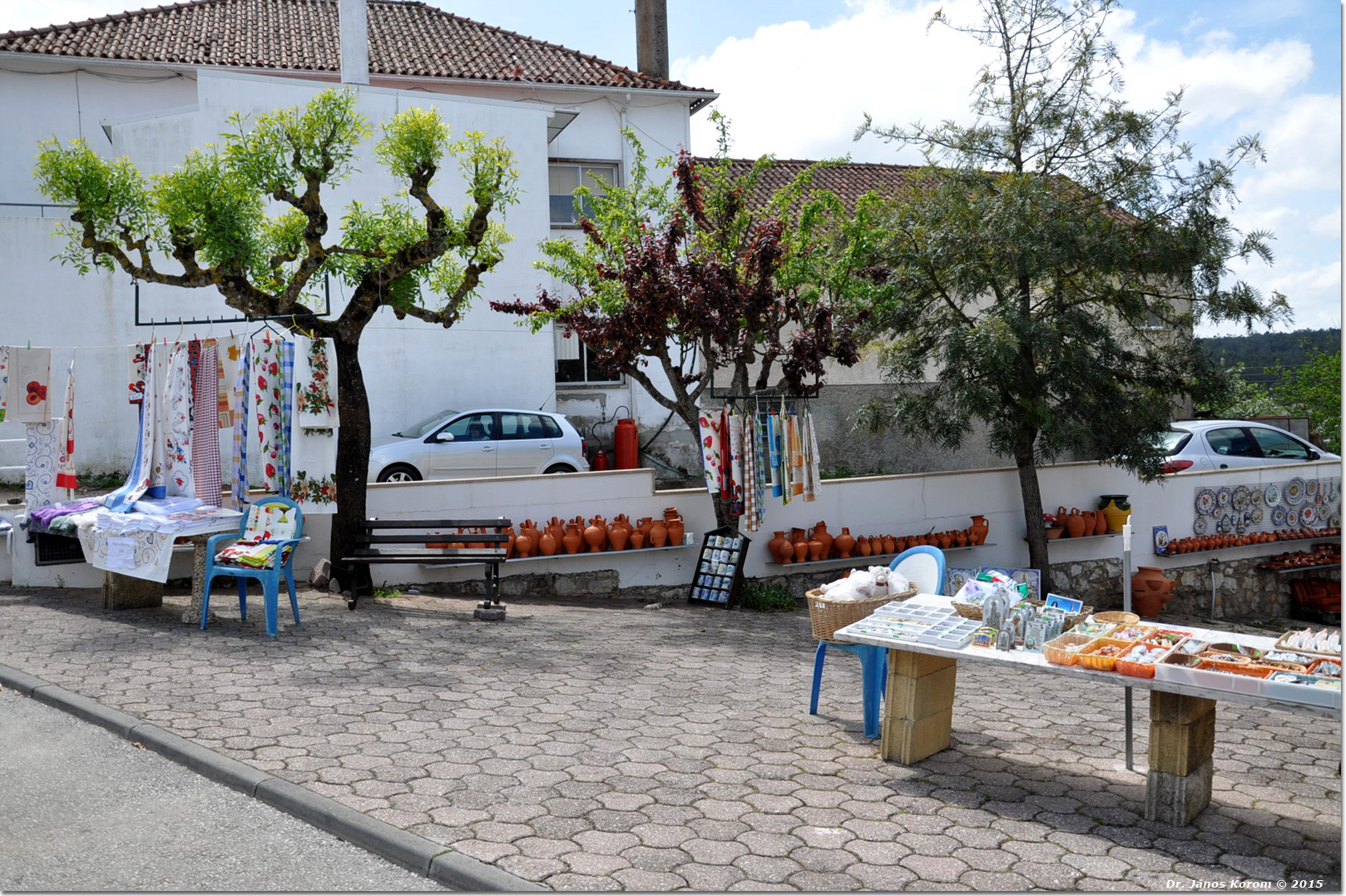 Fatima 0655